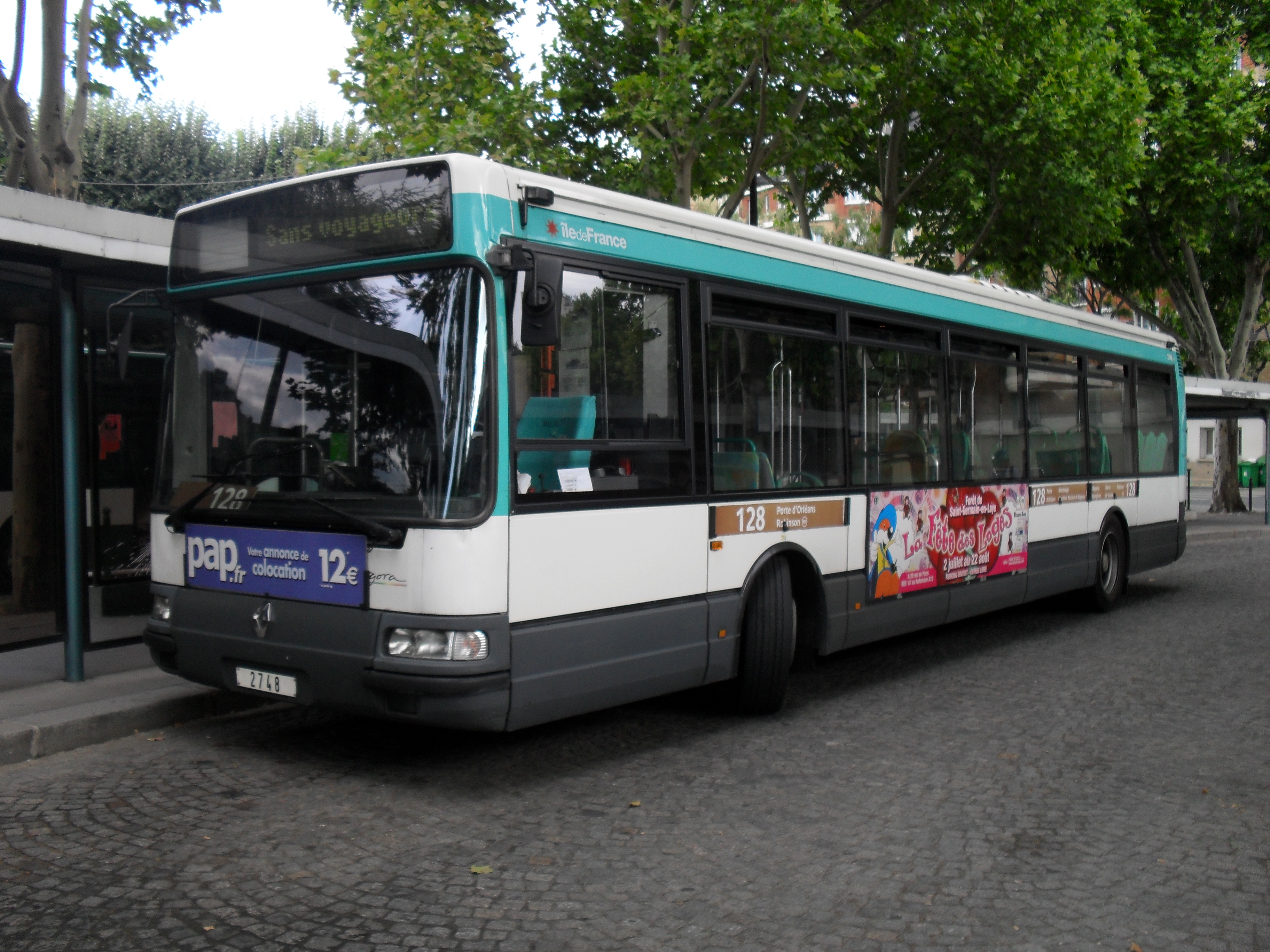 Ligne RATP 128